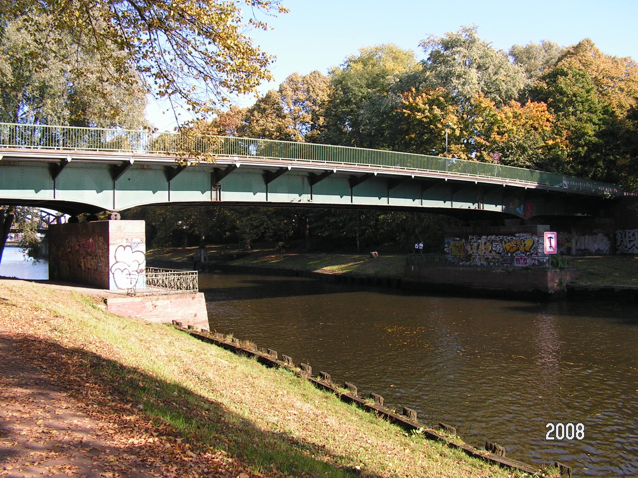 Lübeck/Rehderbrücke